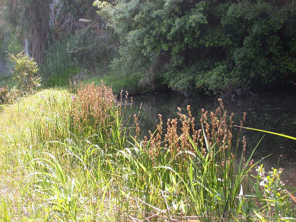 2008/04/29 和歌山県田辺市：Tanabe City. Wakayama Pref. Japan